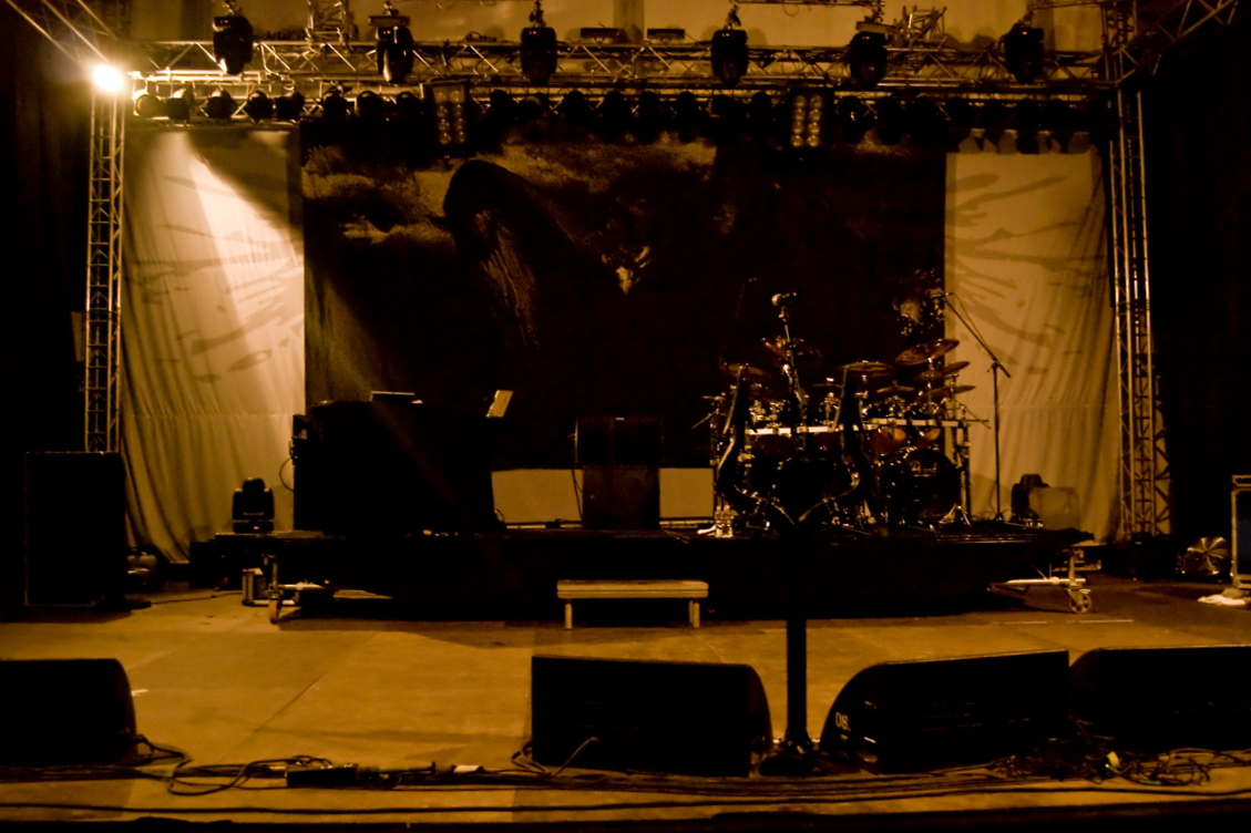 Escenario de Satyricon en el festival de Sziget (Hungría)